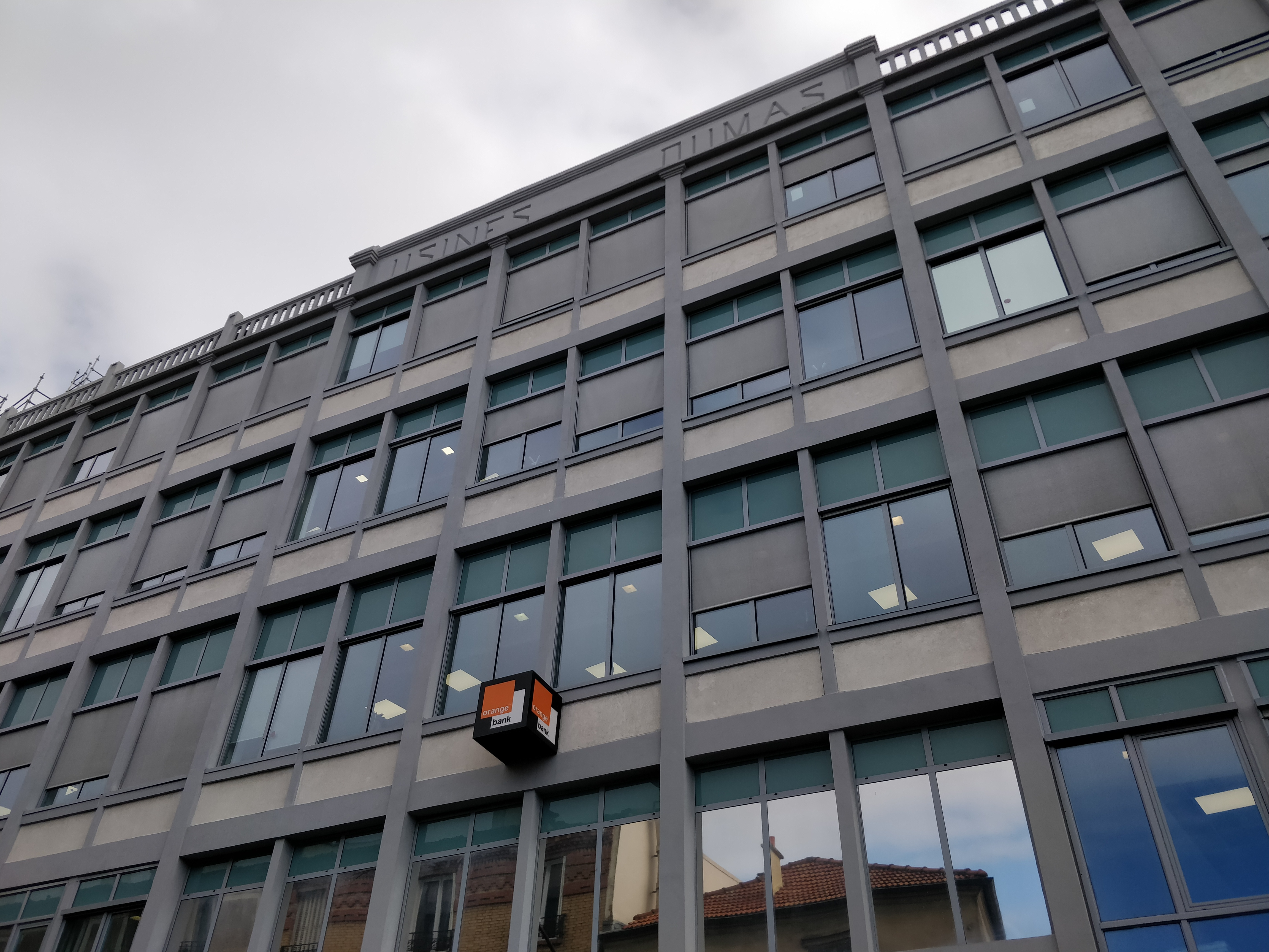 Siège social d'Orange Bank à Montreuil. L'immeuble était anciennement occupé par les usines Dumas.